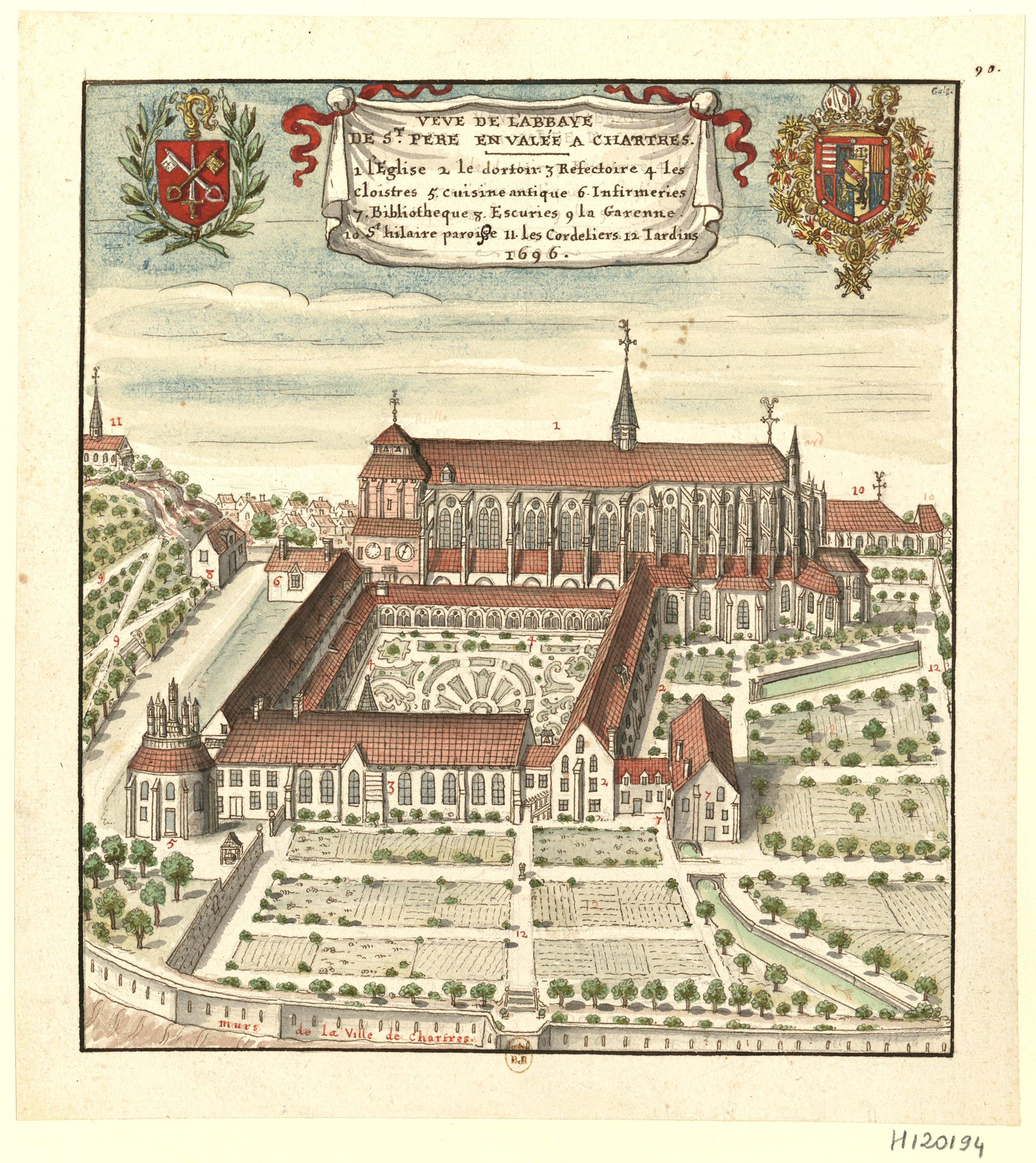 VEUE DE L'ABBAYE :: DE ST PERE EN VALEE A CHARTRES // 1. l'Eglise 2. le dortoir 3 Refectoire 4 Les // cloistres 5. cuisine antique 6. Infirmeries // 7. Bibliotheque 8. Ecuries 9 La Garenne // 10 St Hilaire paroisse 11. les Cordeliers 12. Jardins // 1696 : [dessin] / [Louis Boudan ?]